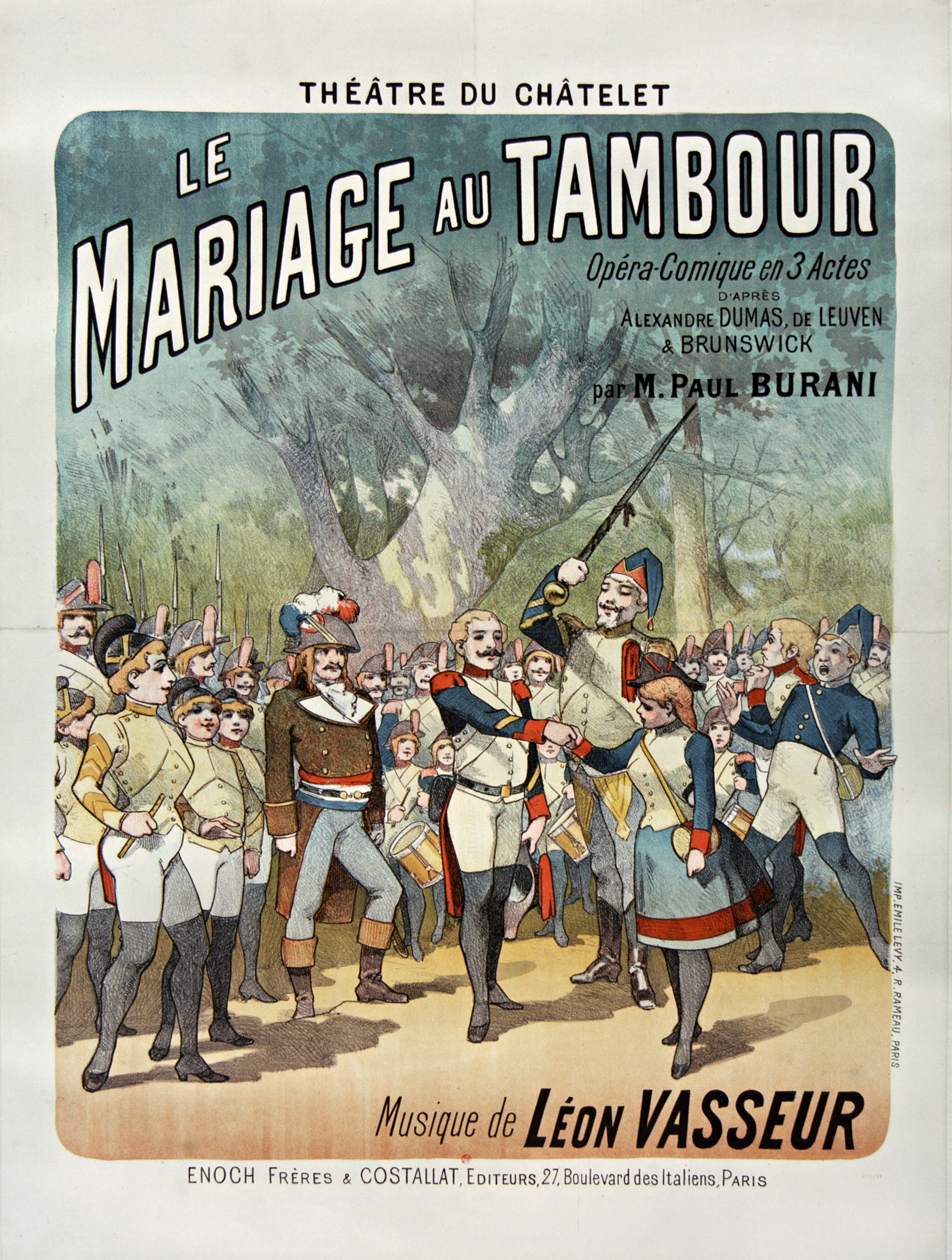 Théâtre du Châtelet. Le Mariage au tambour, opéra comique en trois actes. lithogr. en coul. ; 77 x 58 cm.